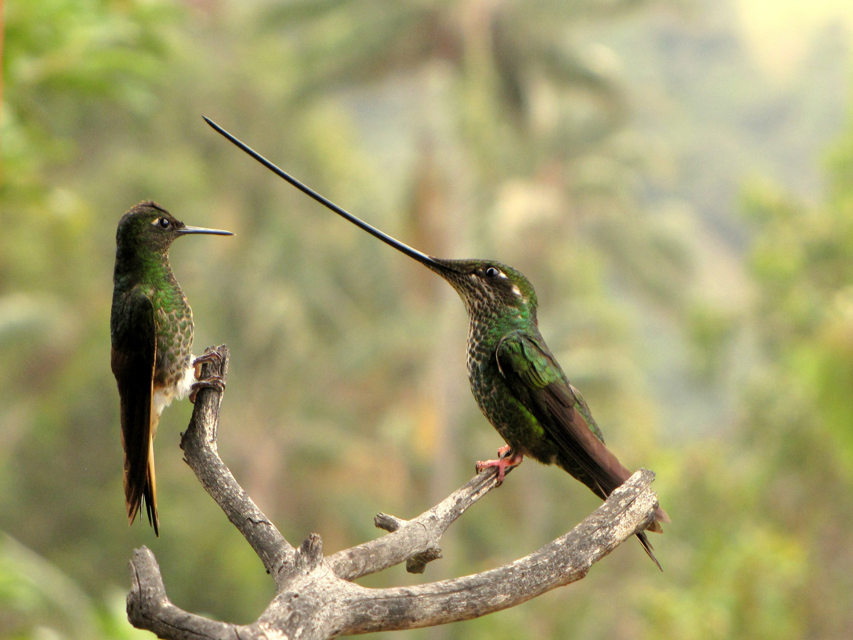 Ensifera ensifera (Pico de sable)